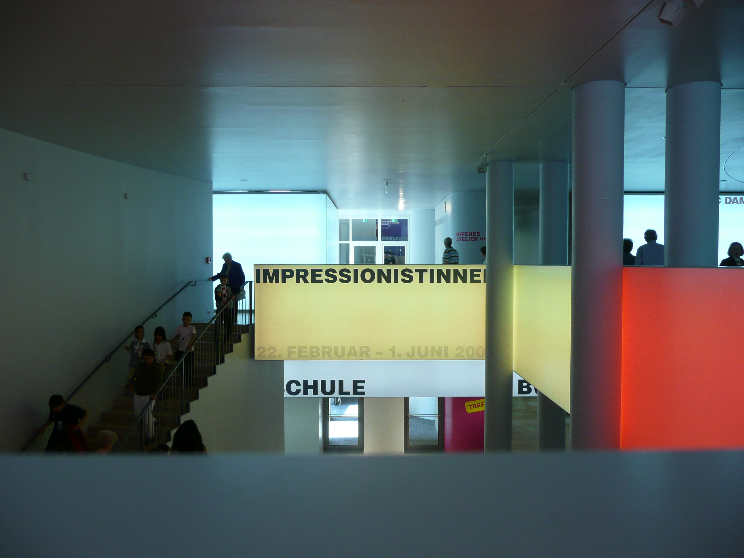 Schirn Kunsthalle, Frankfurt am Main, foyer